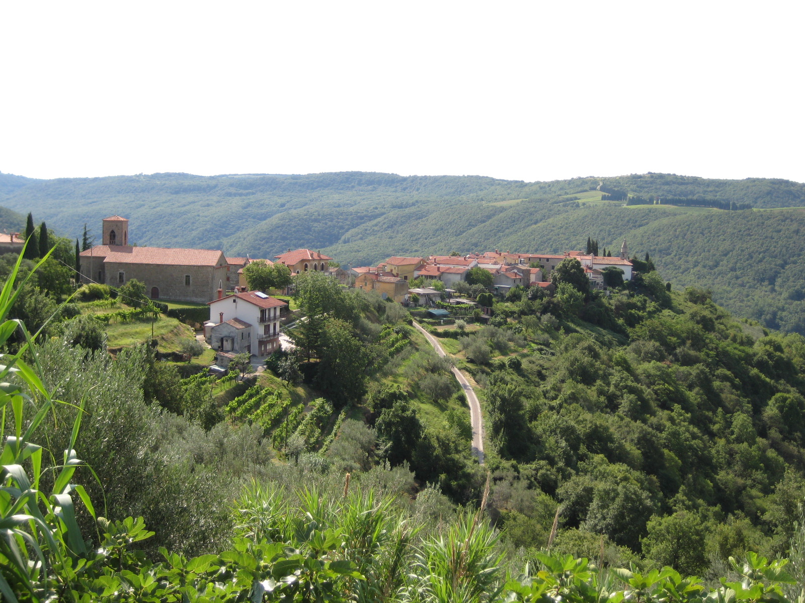 Koštabona, village in Slovenia